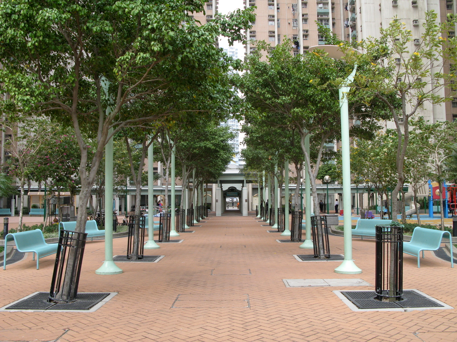 HK Tin Yat Estate Plaza in Tin Shui Wai